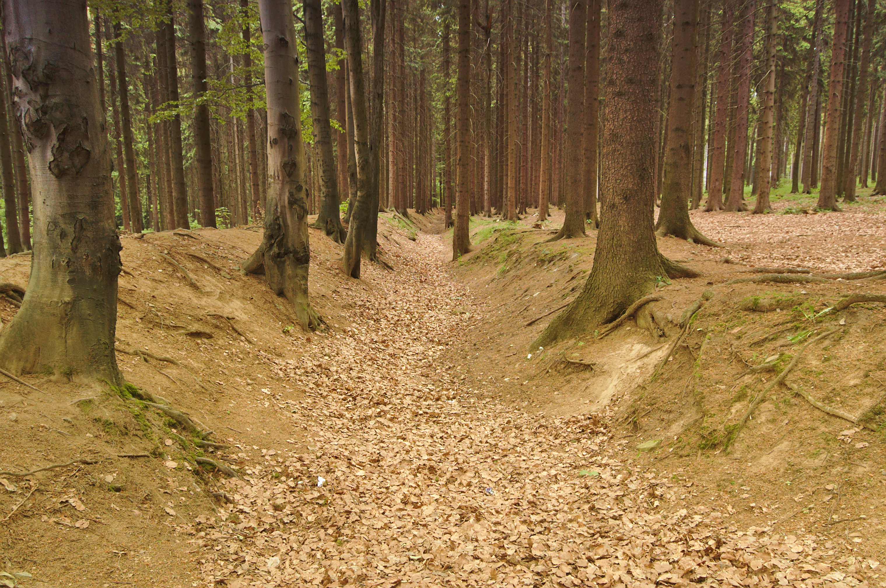 Plavební kanál Suchý - Šmelcovna u penzionu Athéna poblíž obce Suchý, Velenov, okres Blansko